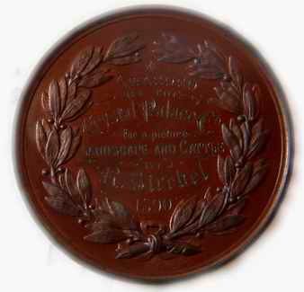 Medaille Crystal Palace